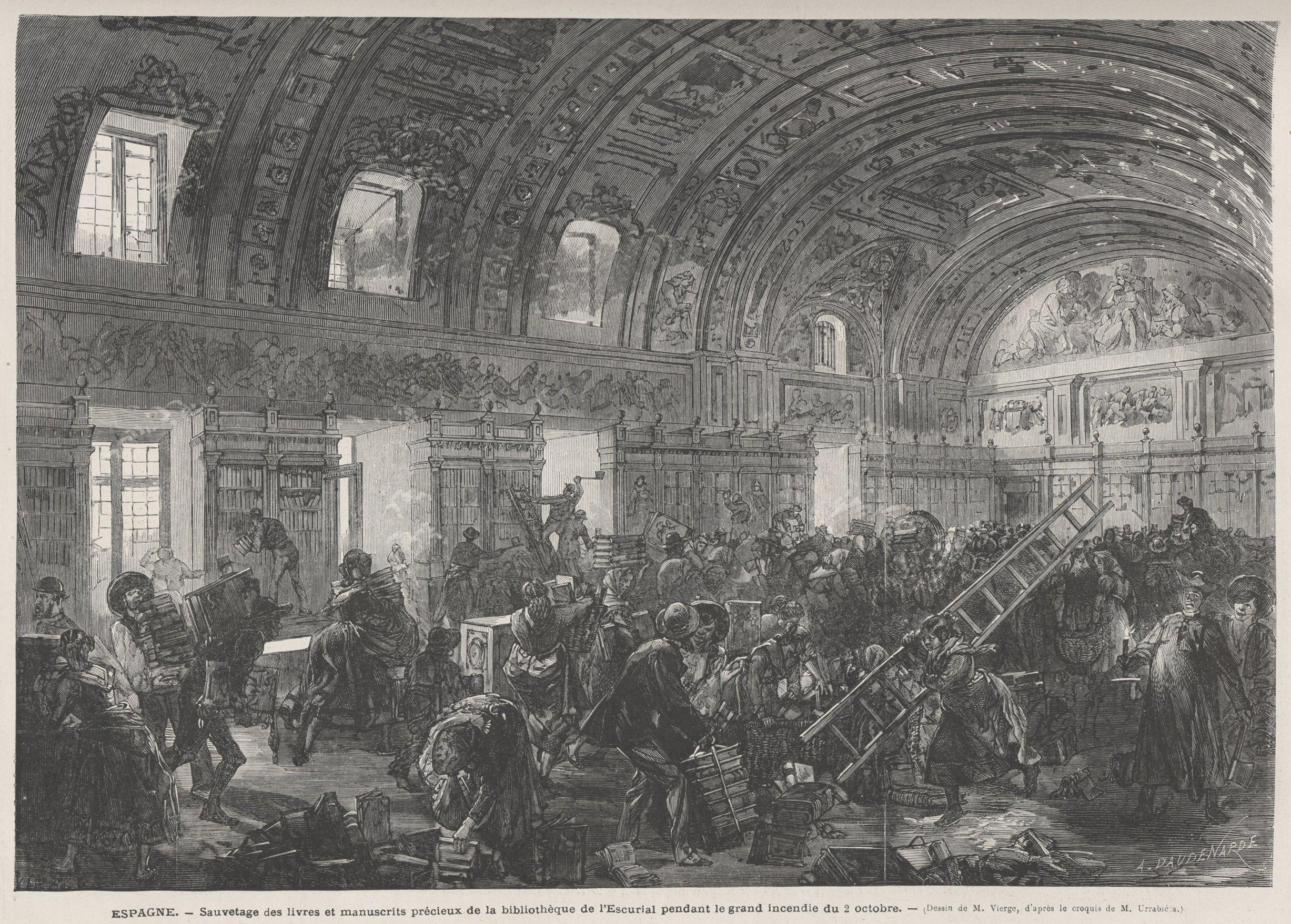 Sauvetage des livres et manuscrits précieux de la bibliothèque de l'Escurial pendant le grand incendie du 2 octobre, (dessin de M. Vierge, d'après le croquis de M. Urrabieta), en la revista Le Monde Illustré.